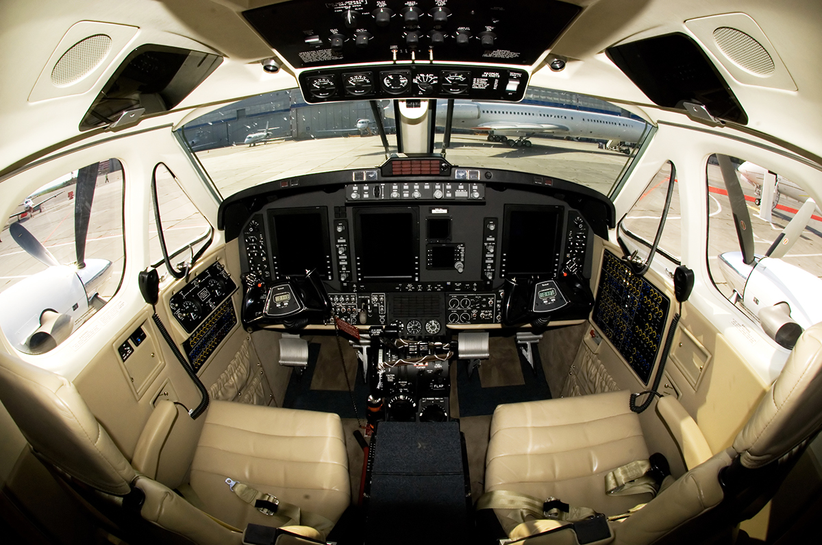 Hawker Beechcraft 350 King Air (B300). N60125.Cockpit